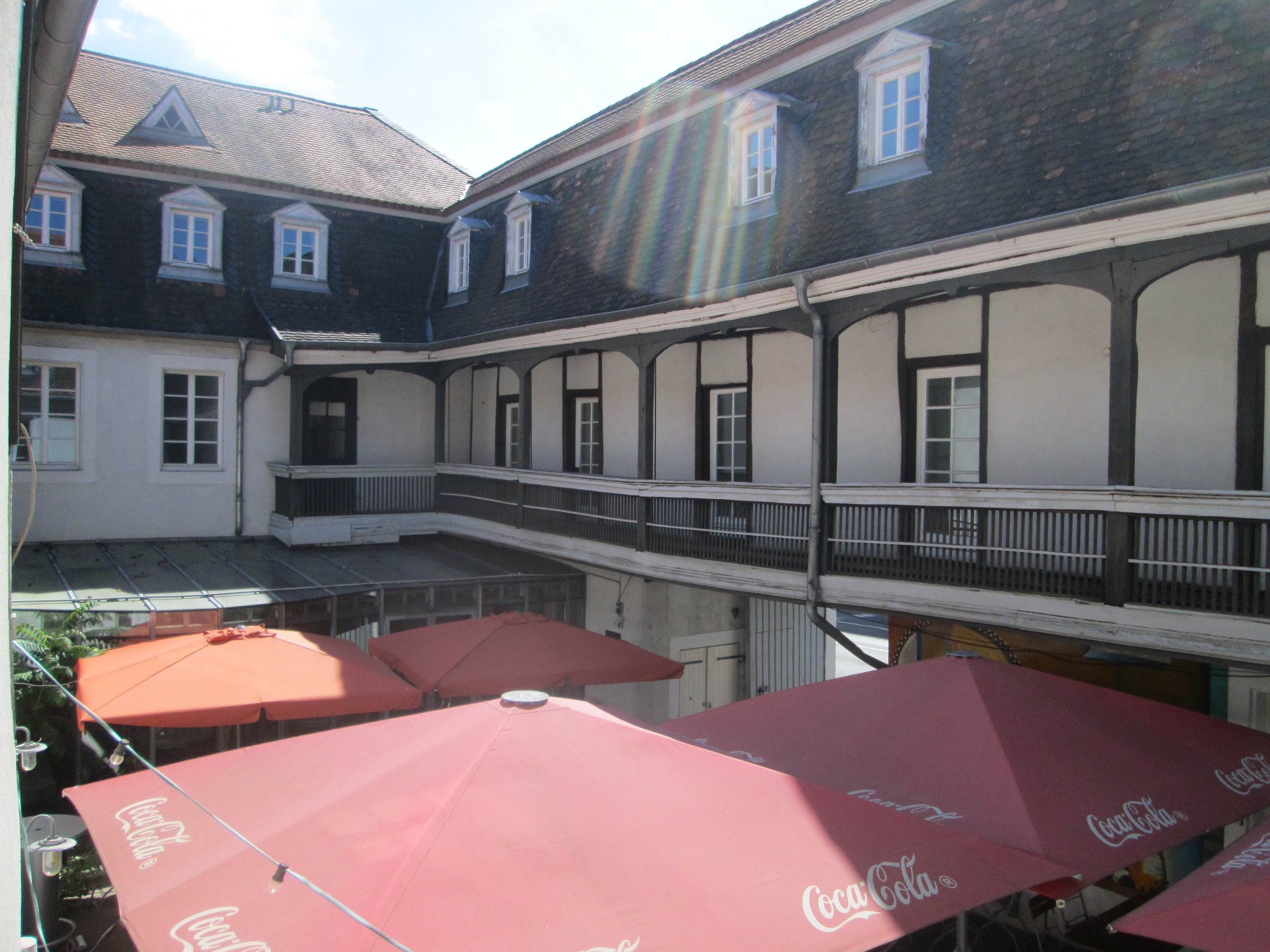 Holzloggia im Innenhof vom Haus Mainzer Straße 2/4 in Saarbrücken